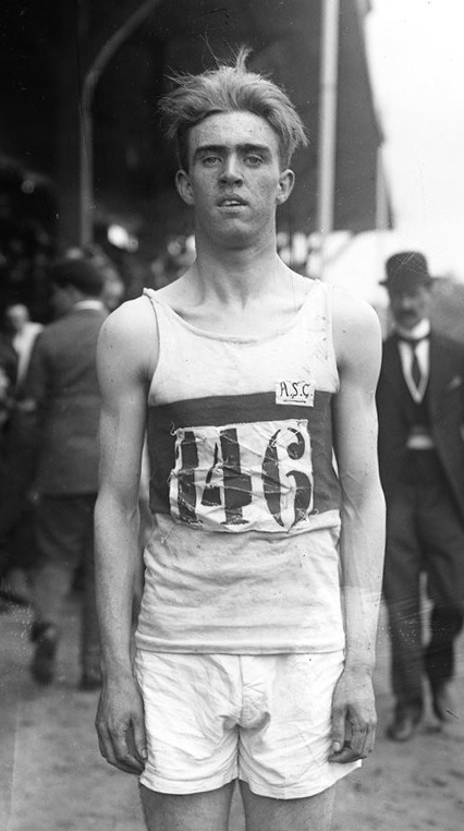 [Portrait du sprinter Emile] Ali Khan [vainqueur du 100 m des championnats de France d'athlétisme, le 18/7/20, stade Pershing] : [photographie de presse] / [Agence Rol]